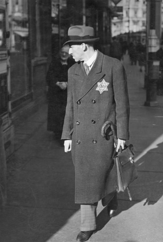 Mann mit Judenstern Zentralbild 26.9.1941 Die Auswirkungen der Nürnberger Rassengesetze von 1935 im faschistischen Deutschland und den von ihnen besetzten Gebieten. Gemäß der am 12.9.1941 veröffentlichten und am 19.9.1941 in Kraft getretenen Polizeiverordnung sind alle Juden verpflichtet, zur Kenntlichmachung den "Davidstern" zu tragen.